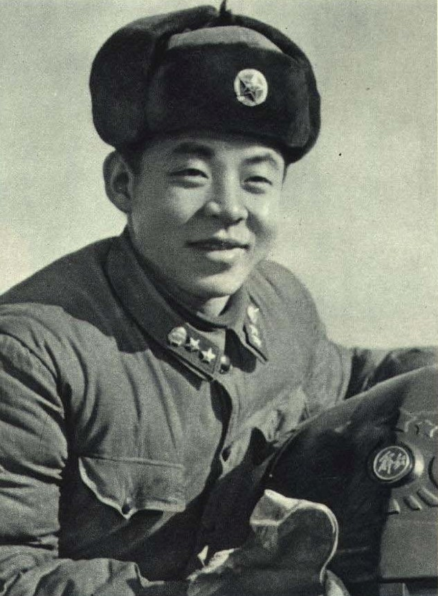 1963-04 1963年 雷锋